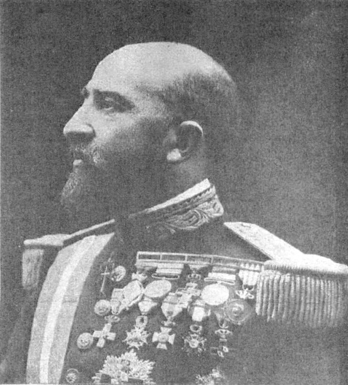 Antero Rubín (Q3394967)